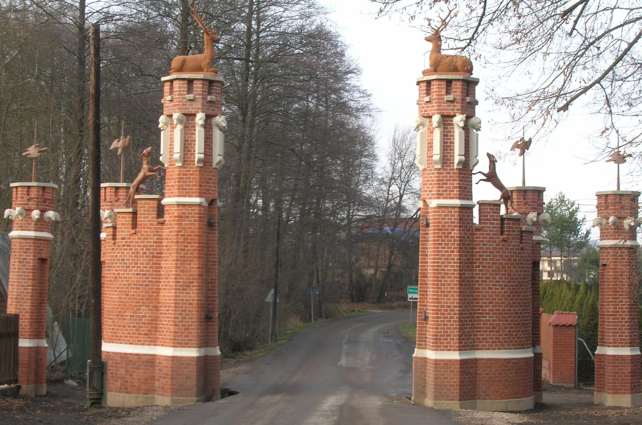 Brama Zwierzyniecka.Tenczynek.Widok od południa.